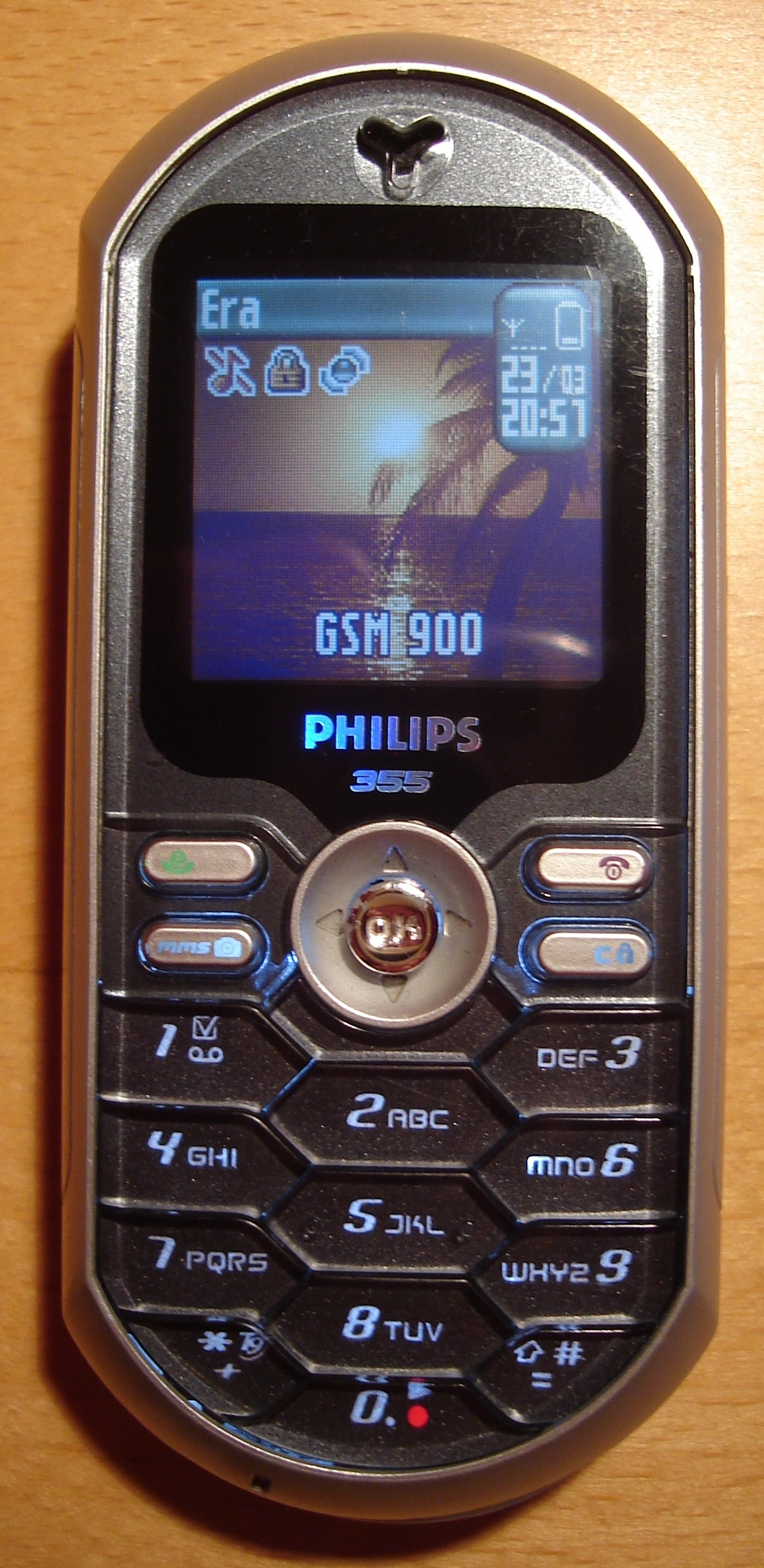 Telefon GSM - Philips 355